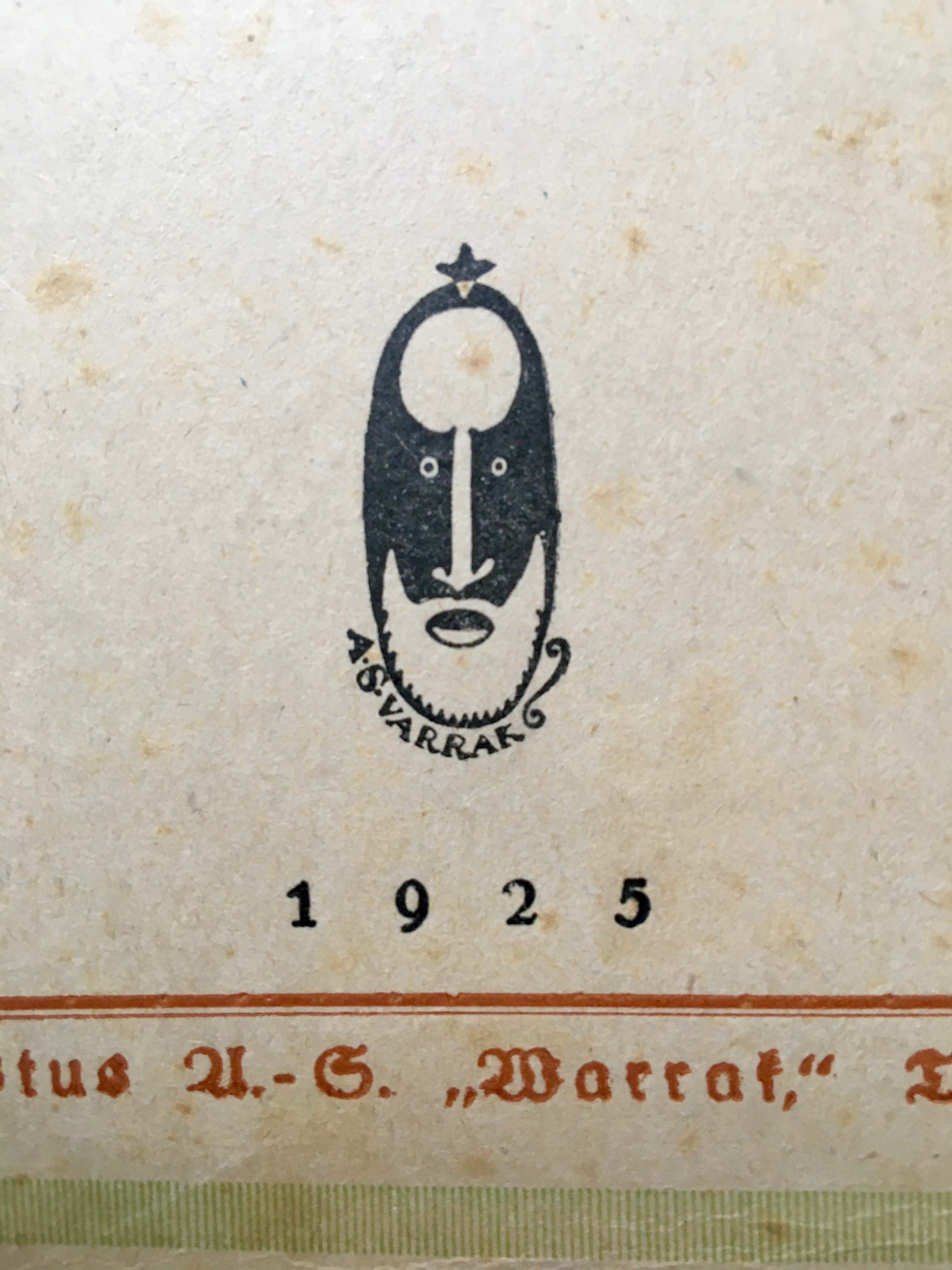 Warrak esikaanel